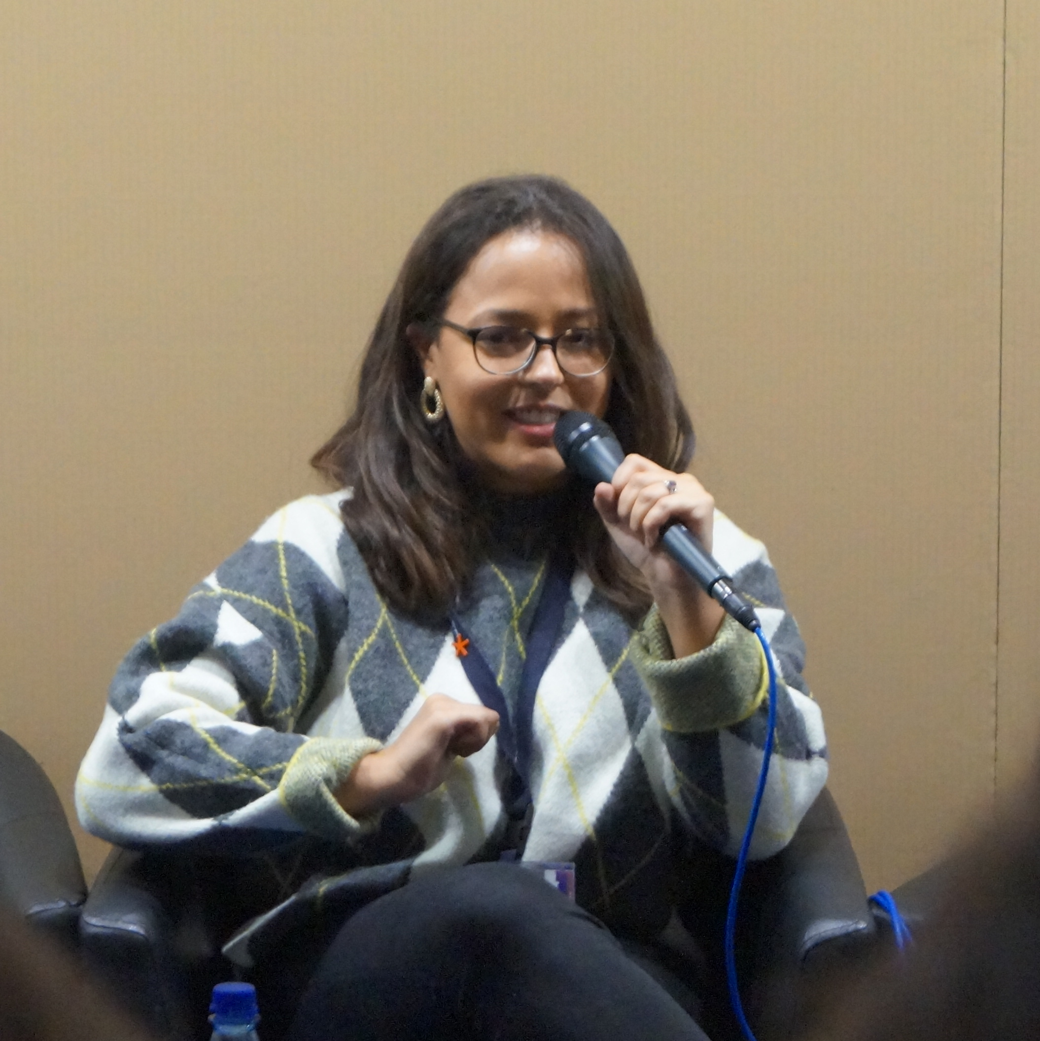 Frankfurter Buchmesse 2019 Personality rights warningAlthough this work is freely licensed or in the public domain, the person(s) shown may have rights that legally restrict certain re-uses unless those depicted consent to such uses. In these cases, a model release or other evidence of consent could protect you from infringement claims.